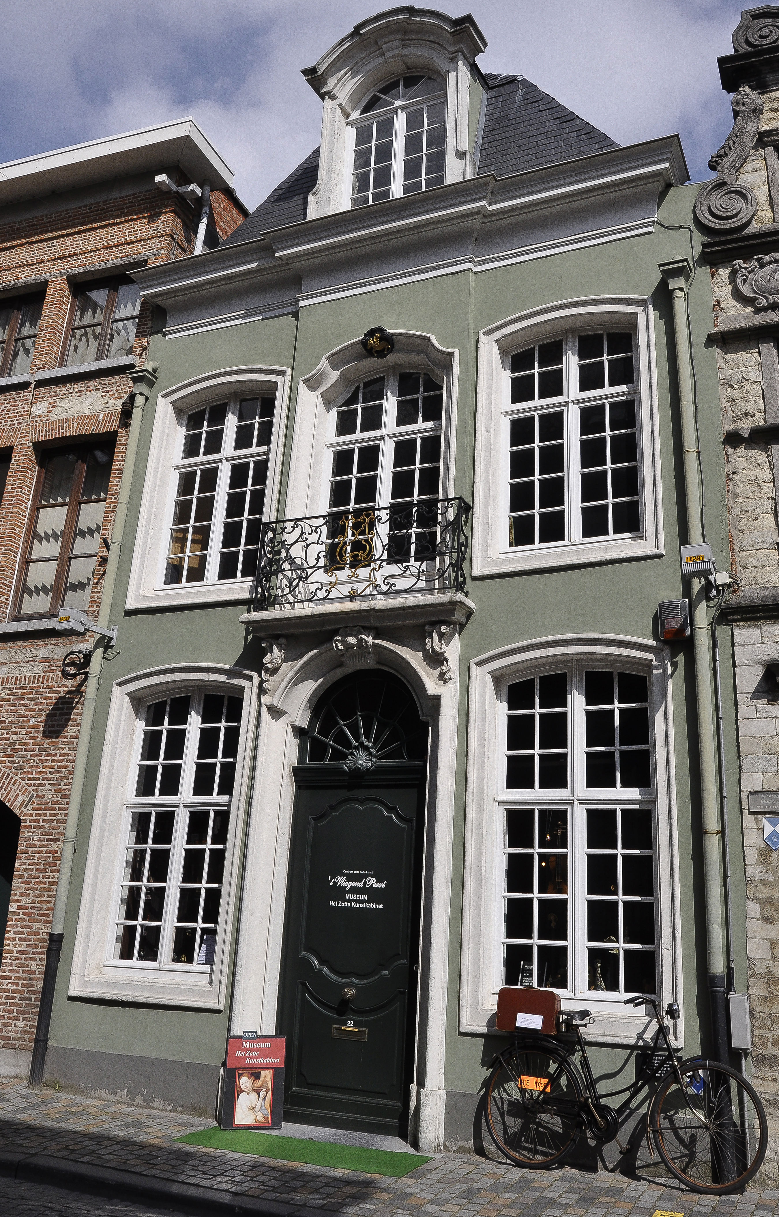 Museum Het Zotte Kunstkabinet in het huis 't Vliegend Peert, in de Sint-Katelijnestraat te Mechelen, België